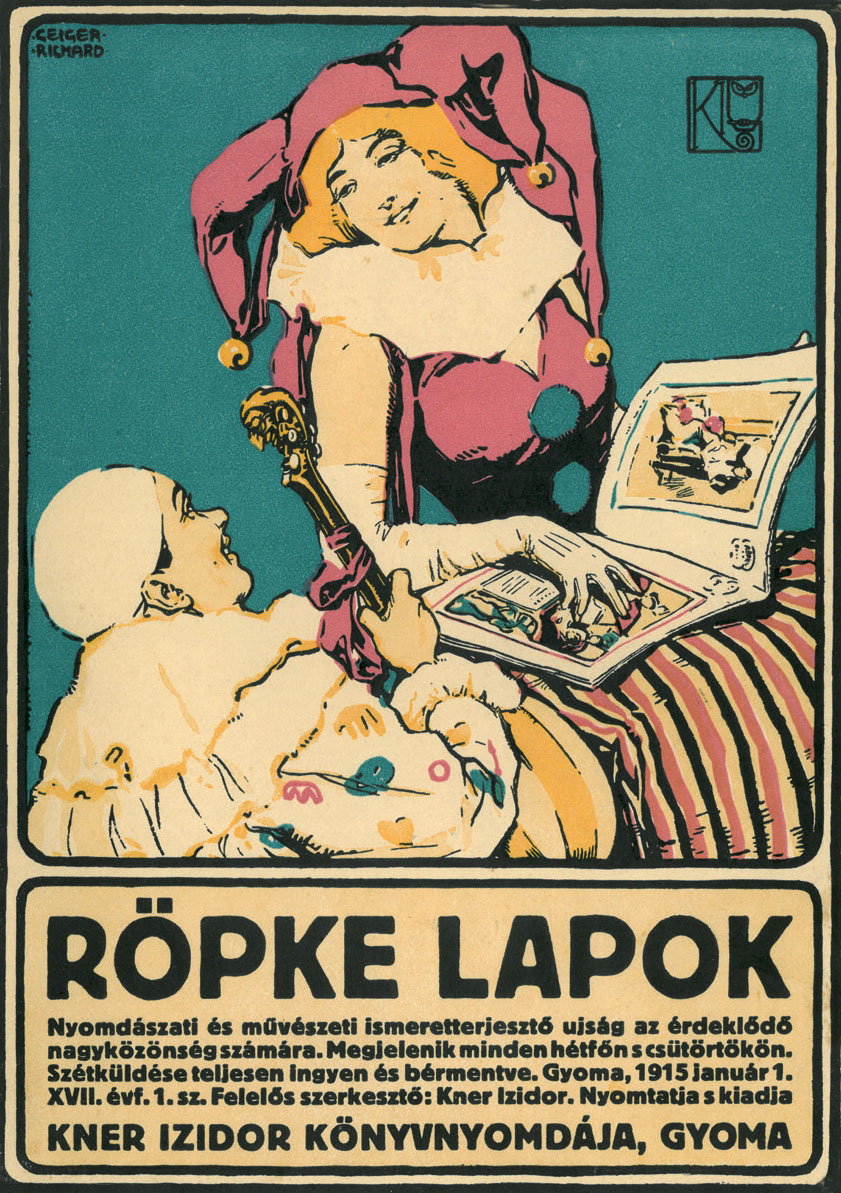 A Röpke Lapok című újság borítója, Kner Izidor kiadványa